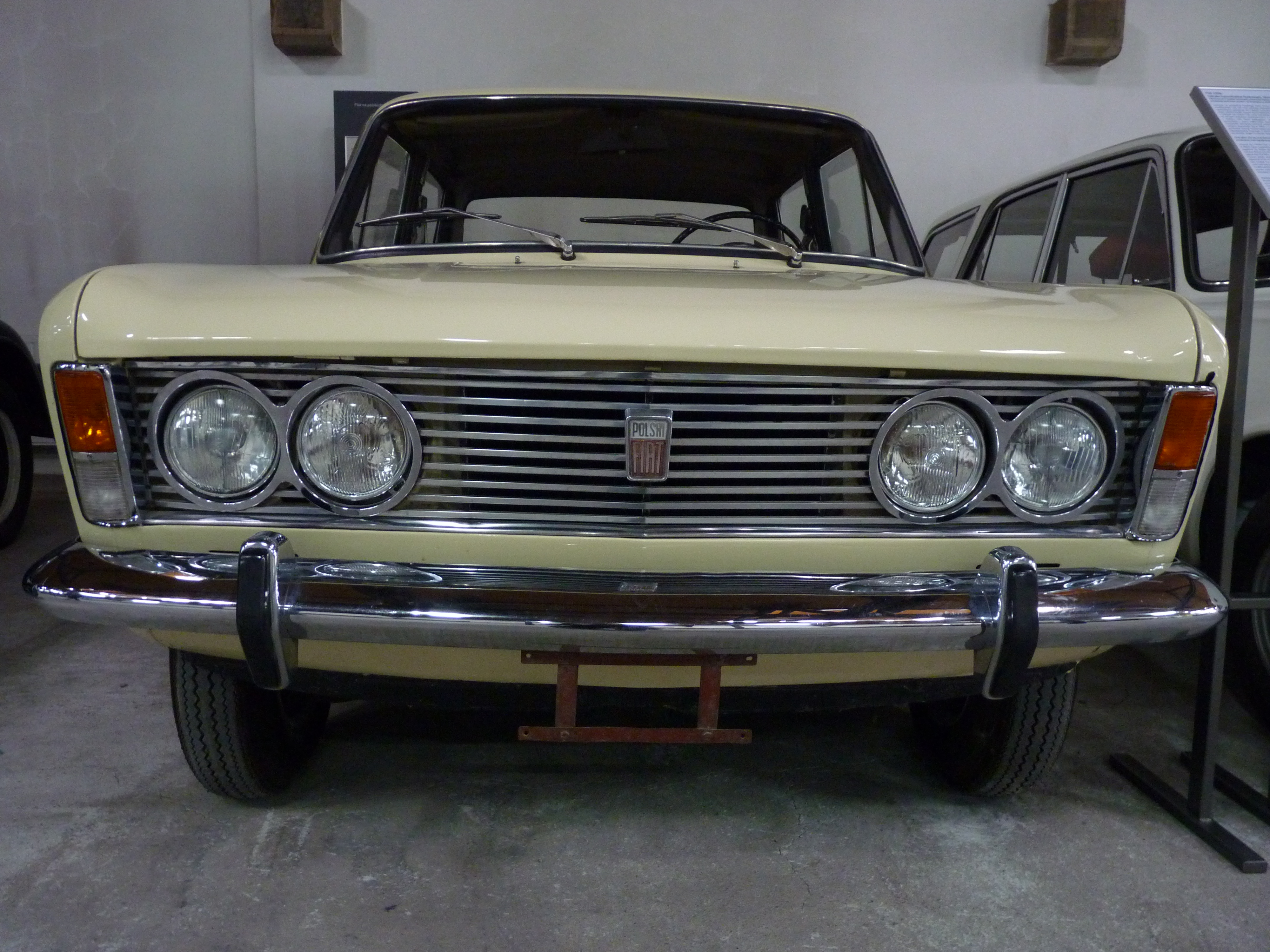 Polski Fiat 125p at the Muzeum Inżynierii Miejskiej in Kraków.JPG